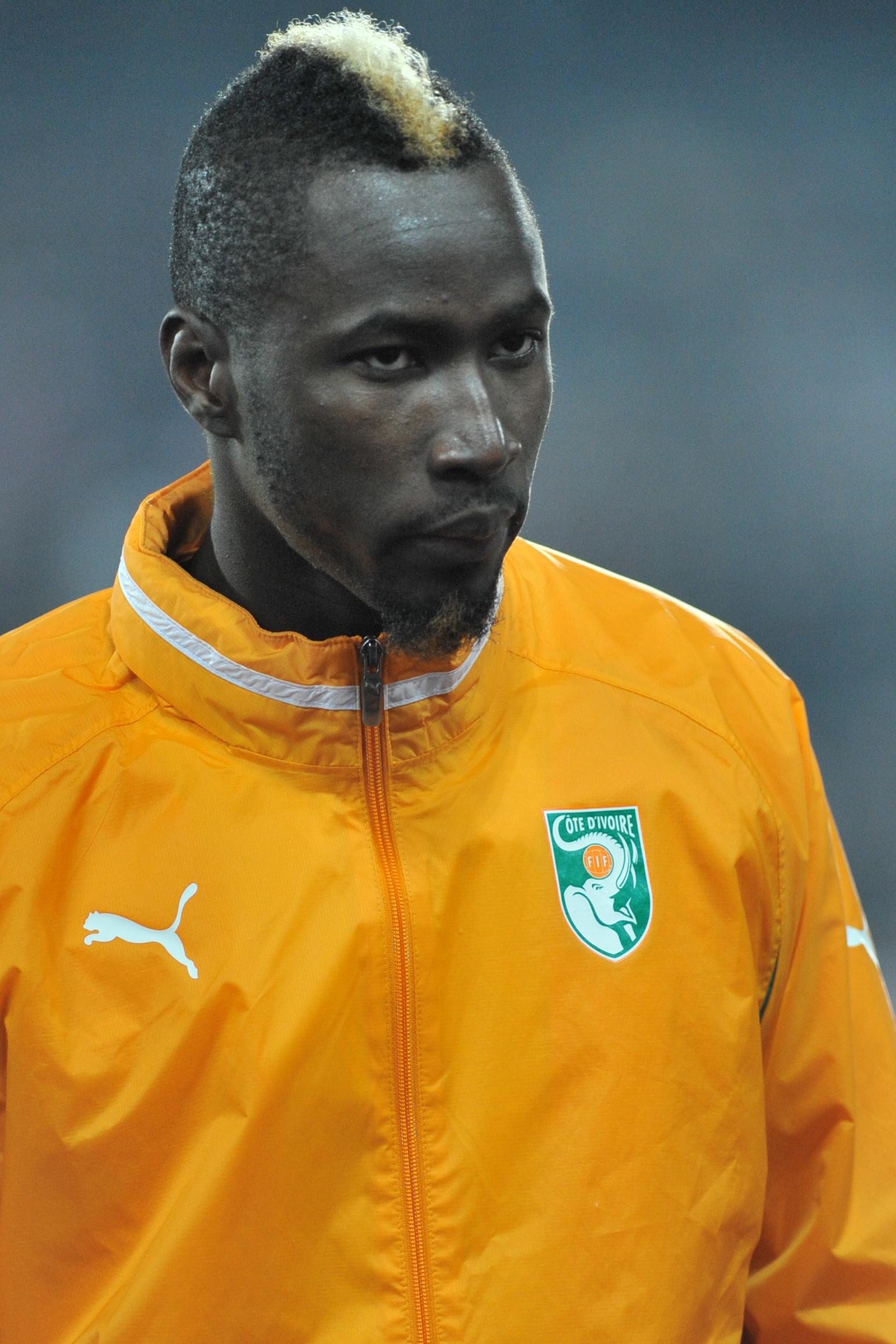 ÖFB freundschaftliches Länderspiel - Österreich vs Elfenbeinküste am 14. November 2012 The making of this work was supported by Wikimedia Austria. For other files made with the support of Wikimedia Austria, please see the category Supported by Wikimedia Österreich. Elfenbeinküste Nr. 18: Lacina Traoré